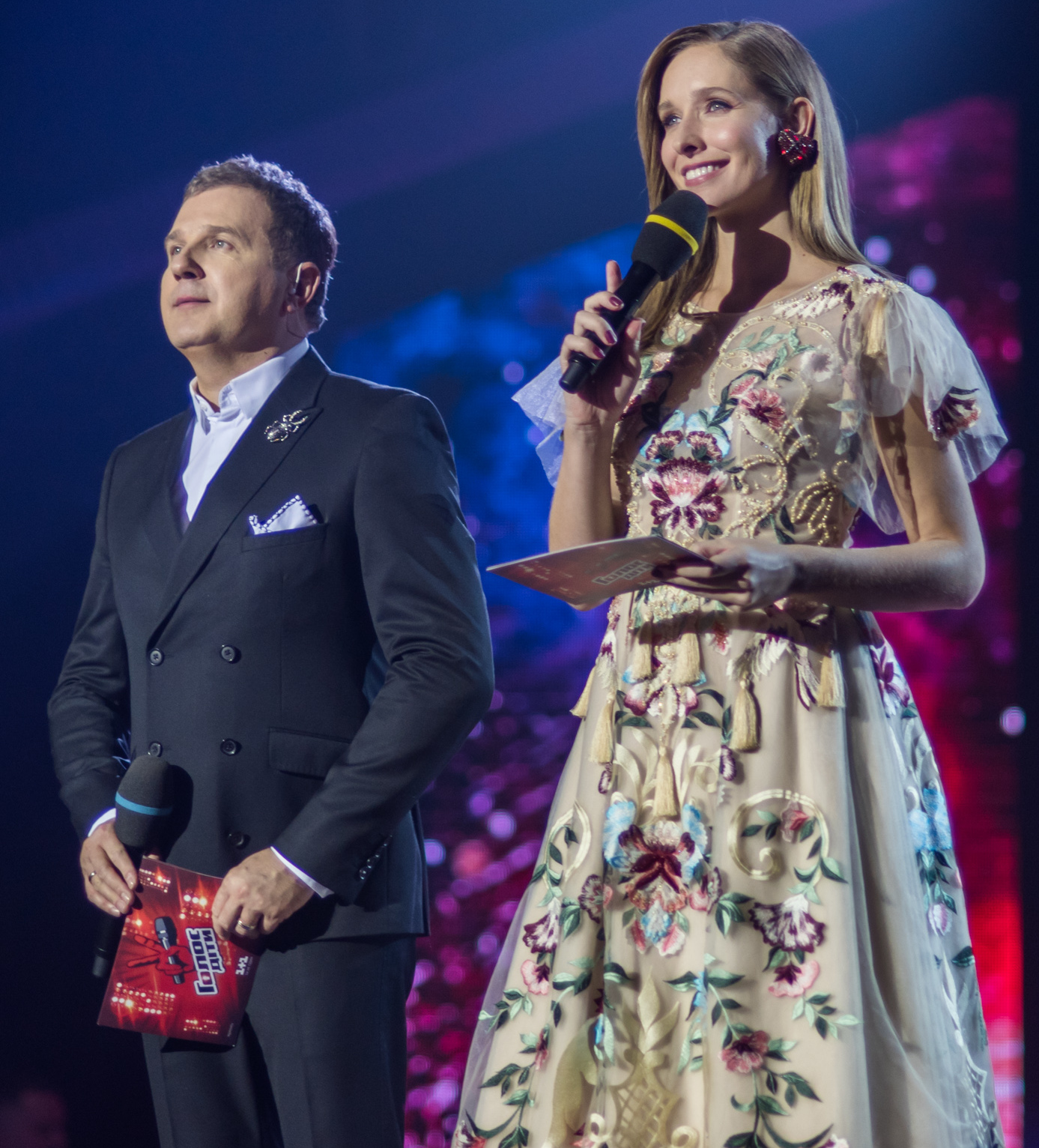 Финал Голос. Дiти 4. Ведущие Юрий Горбунов и Екатерина Осадчая